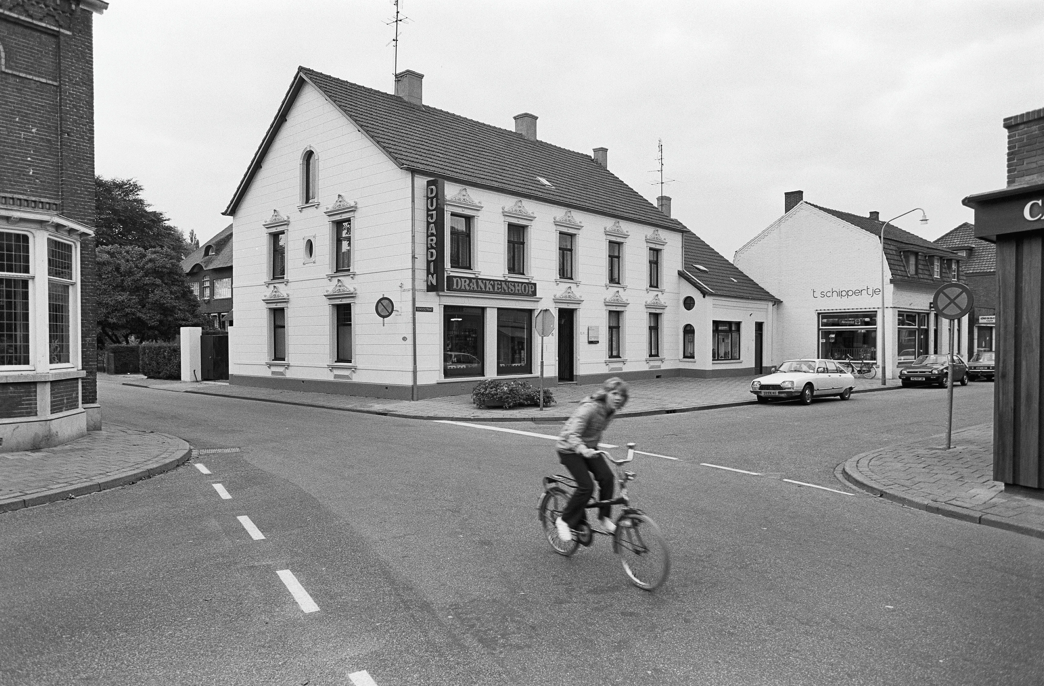 overzicht